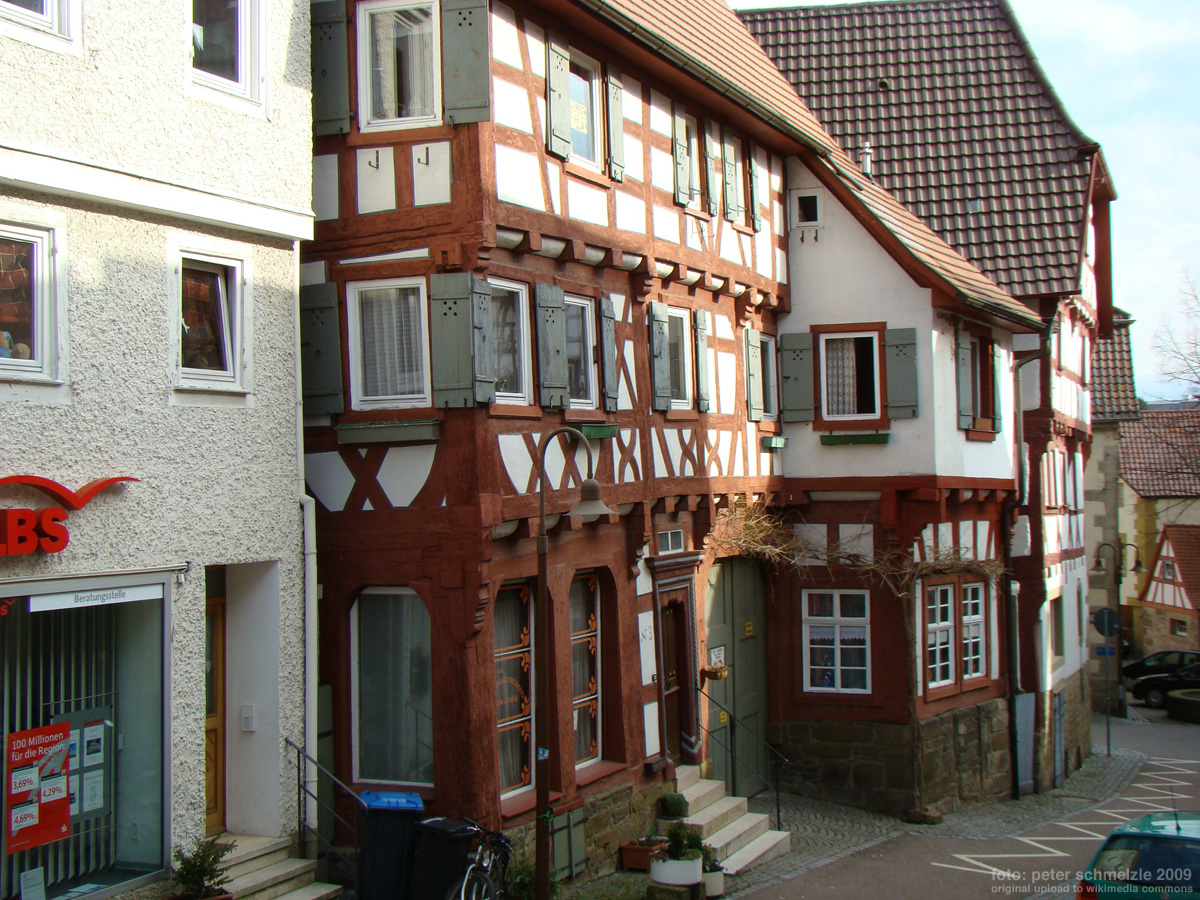 Historisches Gebäude St.-Peters-Gasse 3 in Eppingen